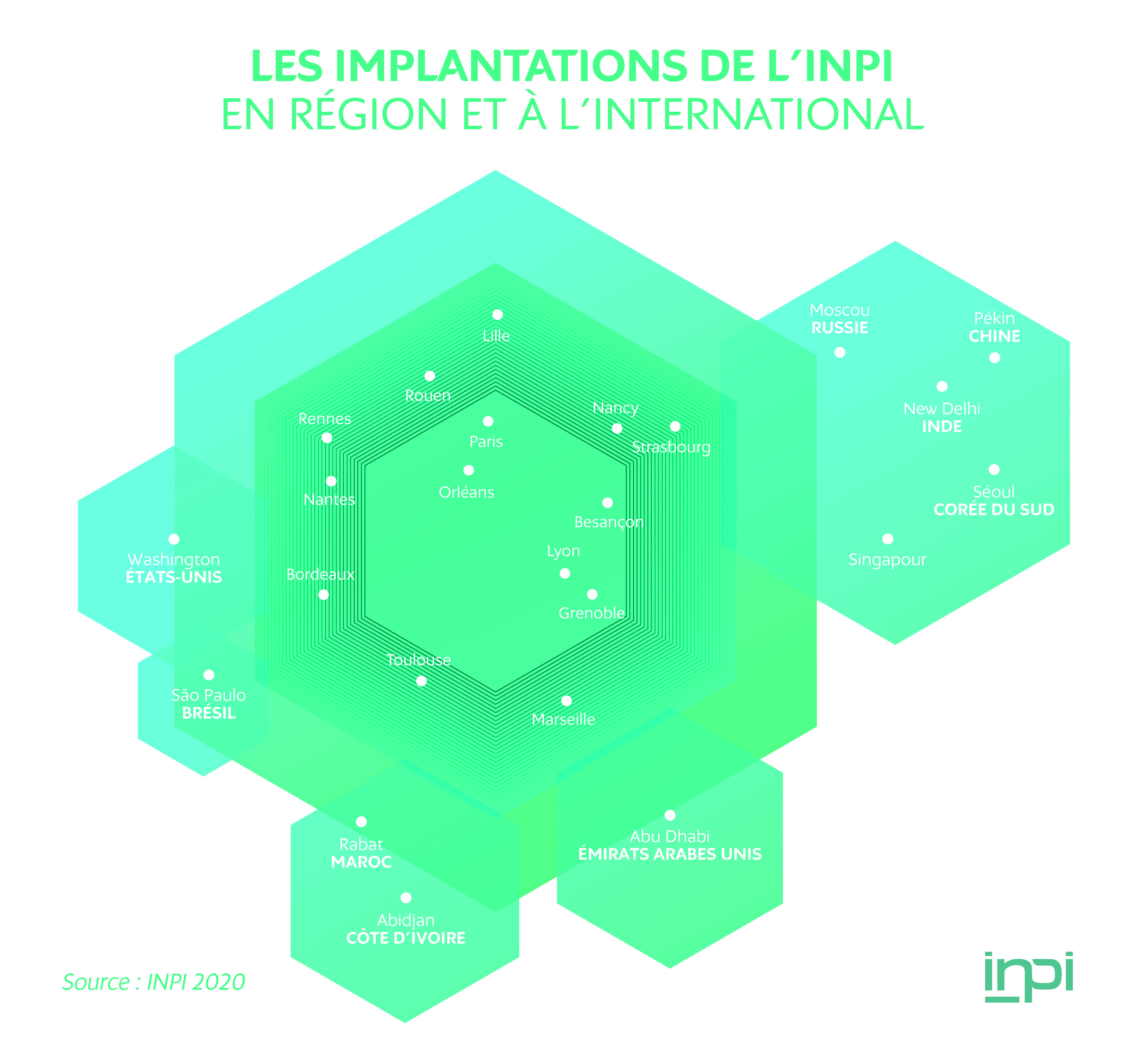 Les implantations de l’INPI en région et à l’international